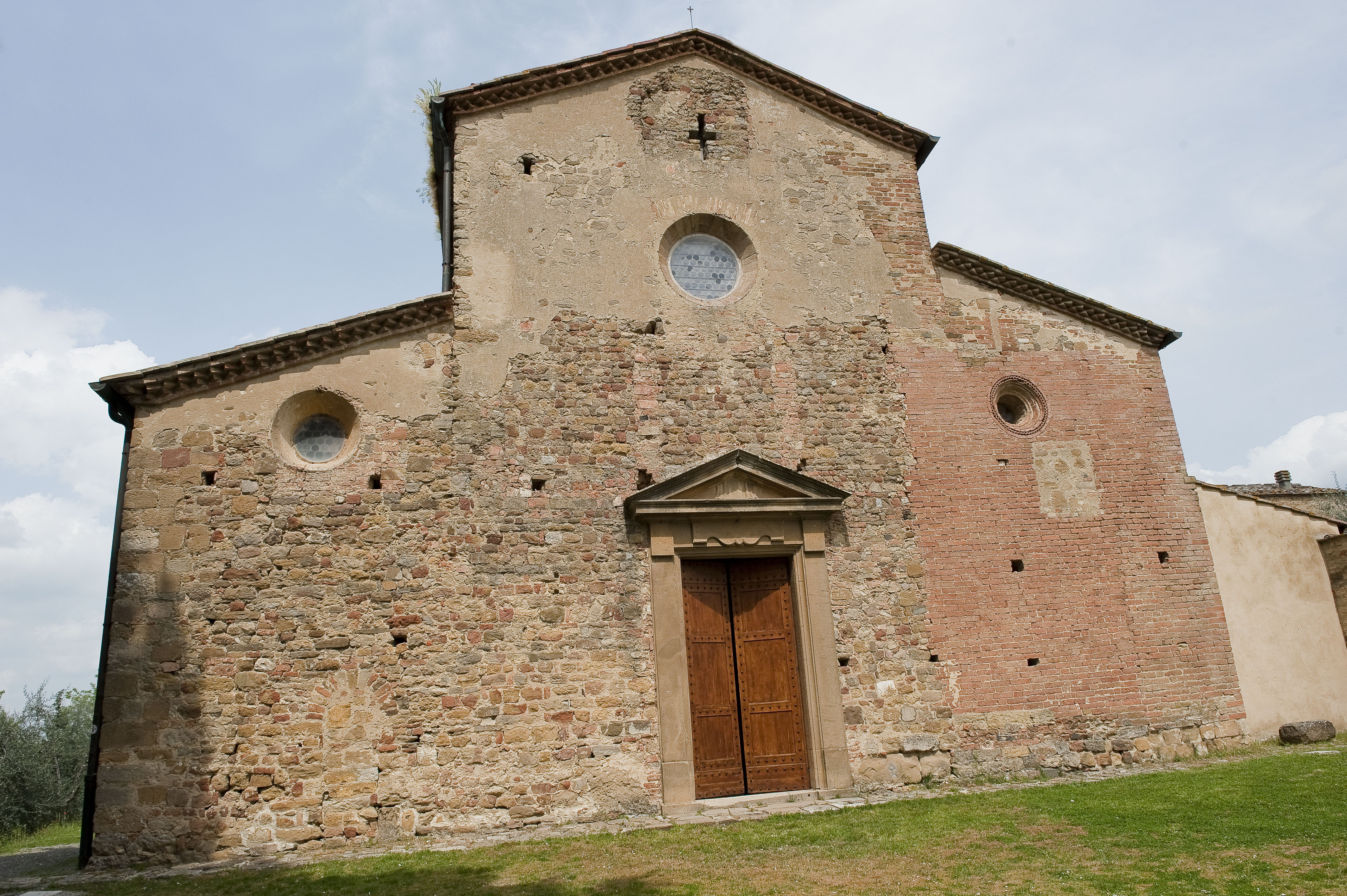 Facciata della pieve di Sant'Appiano, Barberino Val d'Elsa